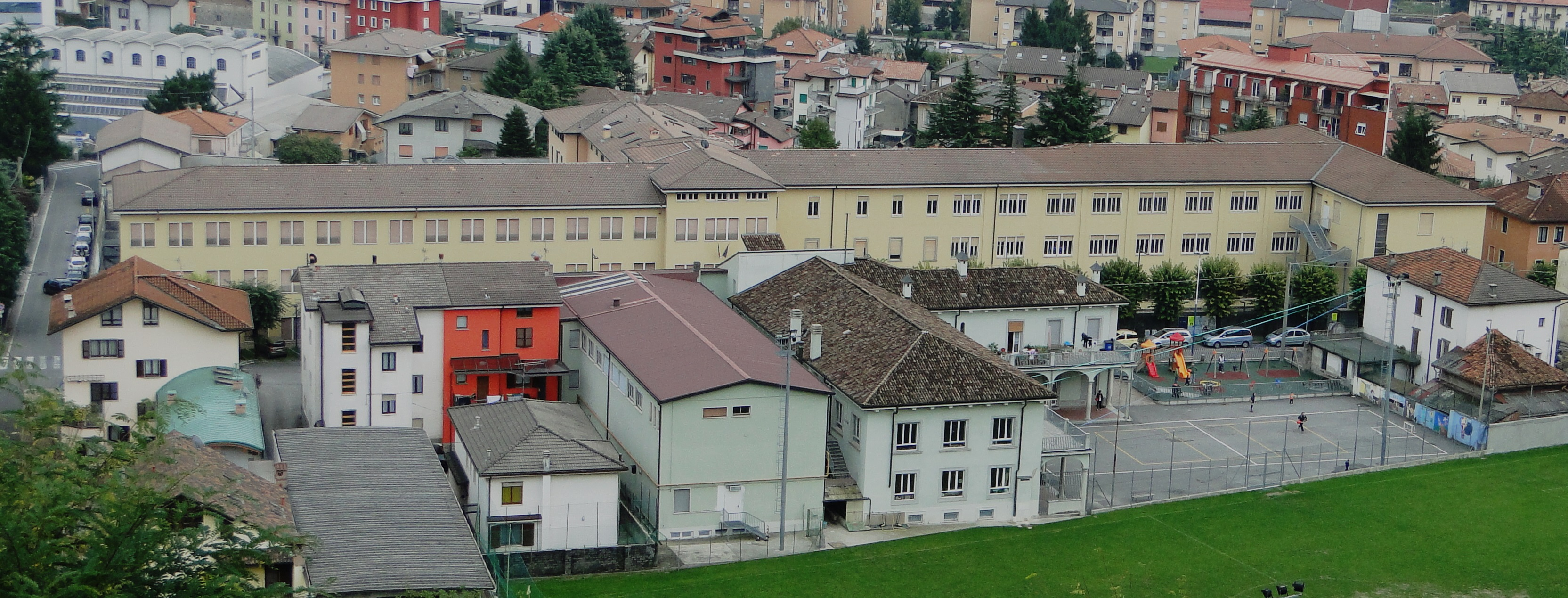 Convento suore Orsoline, Fiorano al Serio, Bergamo, Italia